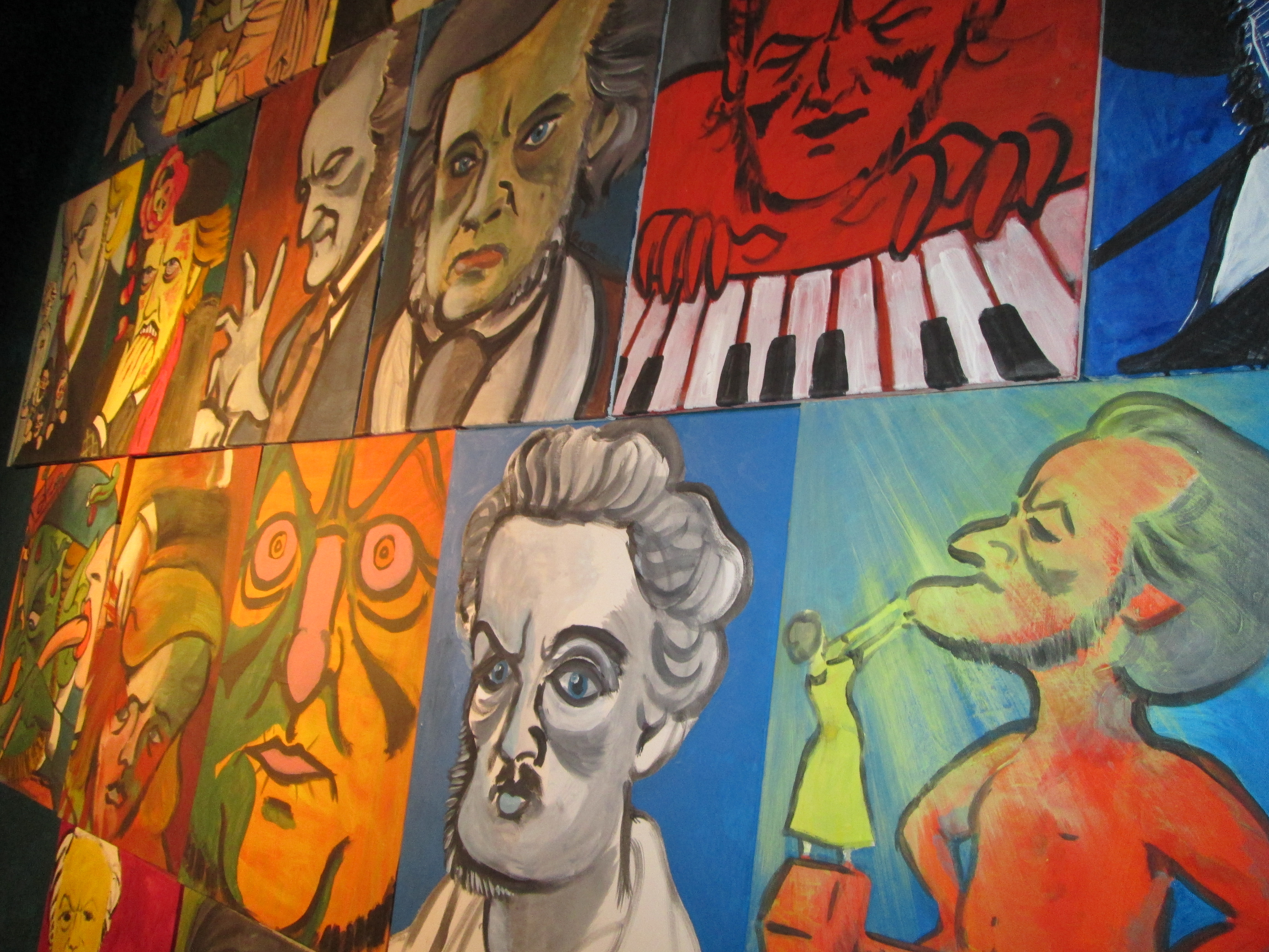 Portraitserie "Wagner-Wahn-Sinnlich" (Acryl auf Leinwand) des Malers Reinhard Trinkler